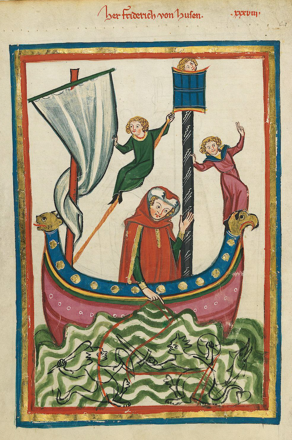 Codex Manesse, UB Heidelberg, Cod. Pal. germ. 848, fol. 116v: Herr Friedrich von Hausen